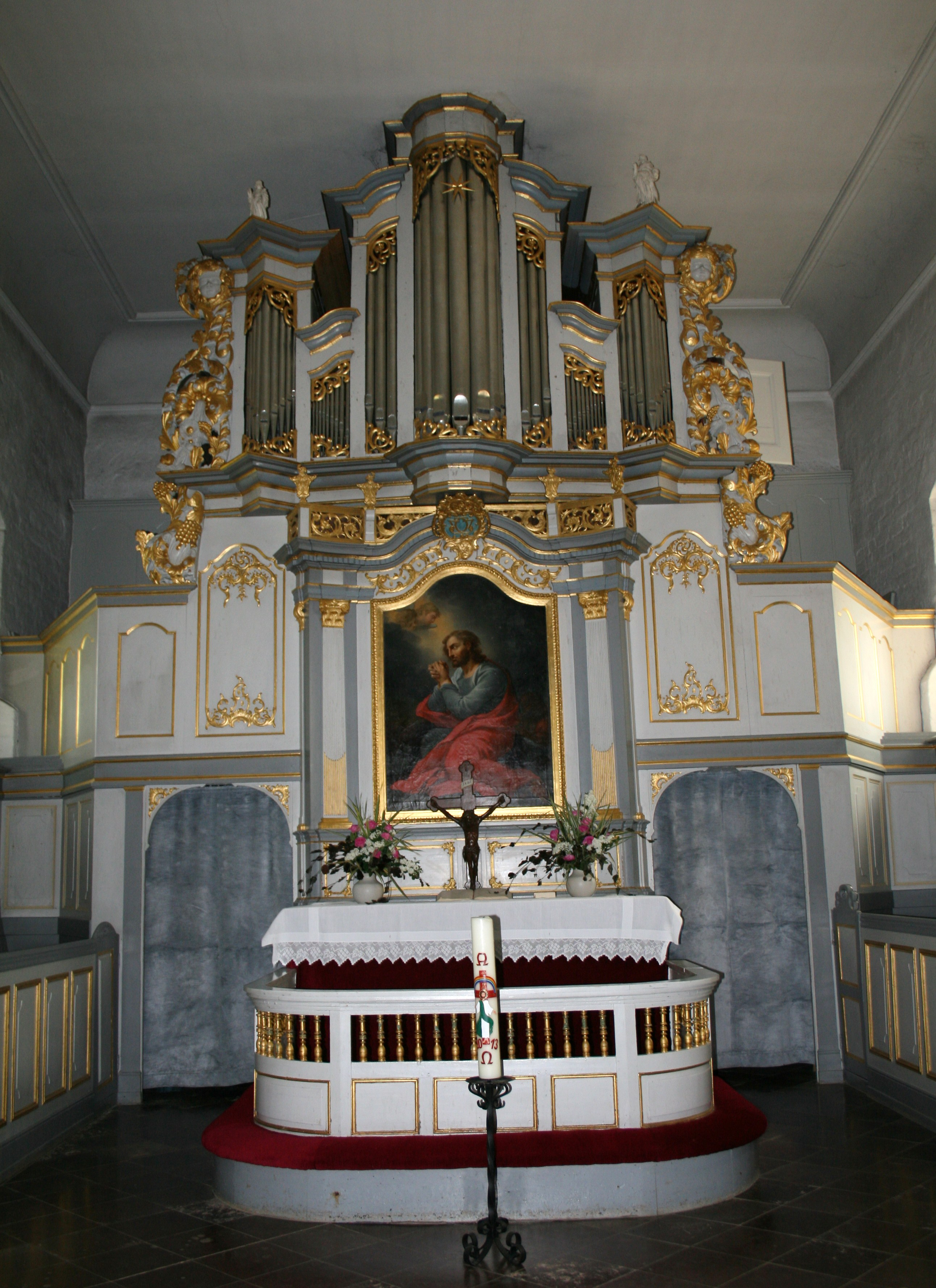 Altar und Orgel der Marienkirche (Rabenkirchen). Altarbild von Christian August Lorentzen.